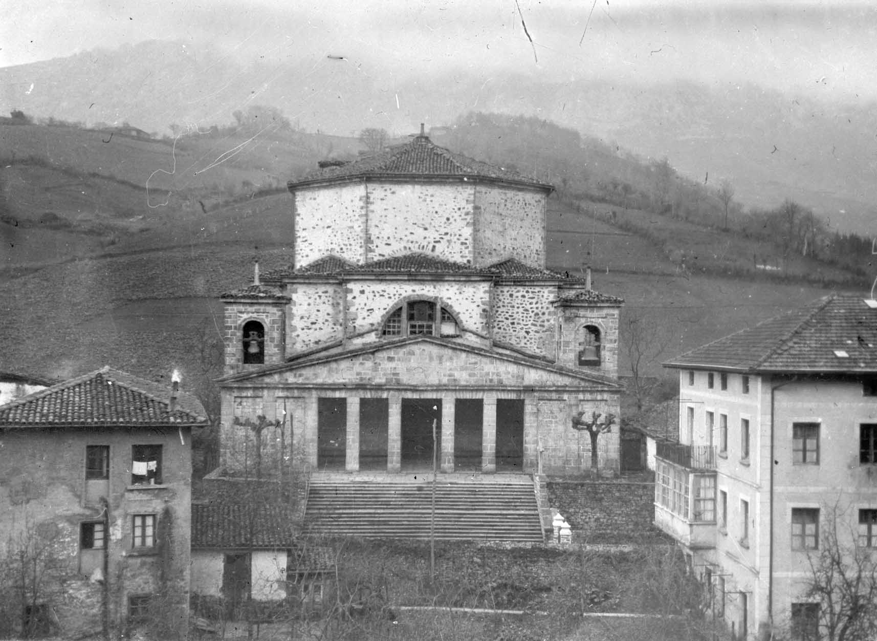 Ibarrako (Aramaio) eliza 1955ean